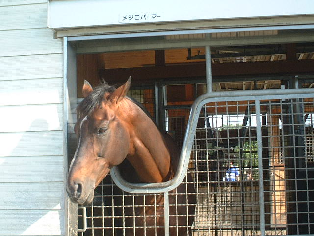 メジロパーマー。アロースタッドにて撮影。